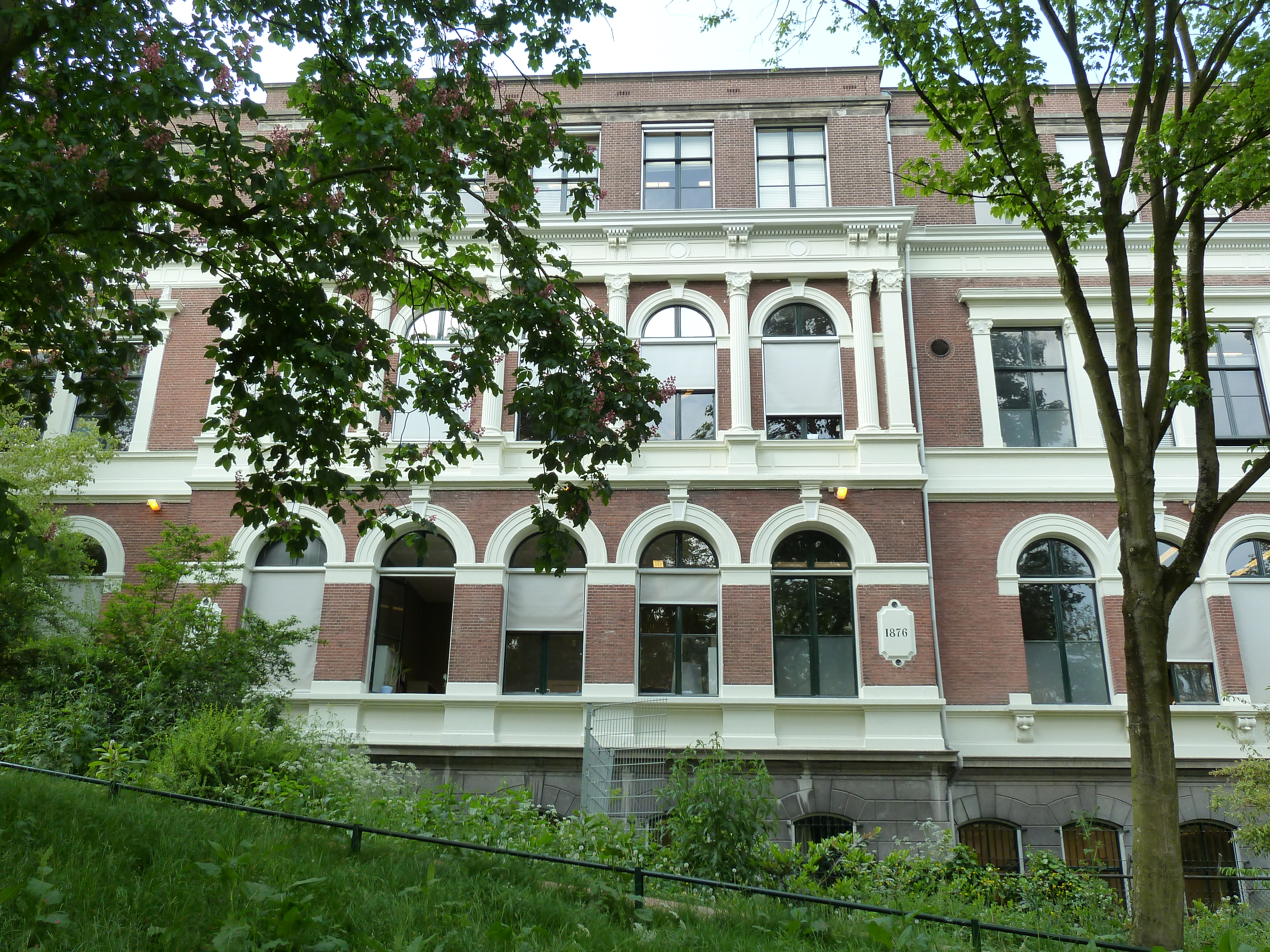 Bijlhouwerstraat 8, Utrecht. NL. Achterzijde, gezien van Zocherplantsoen. Rijksmonument.